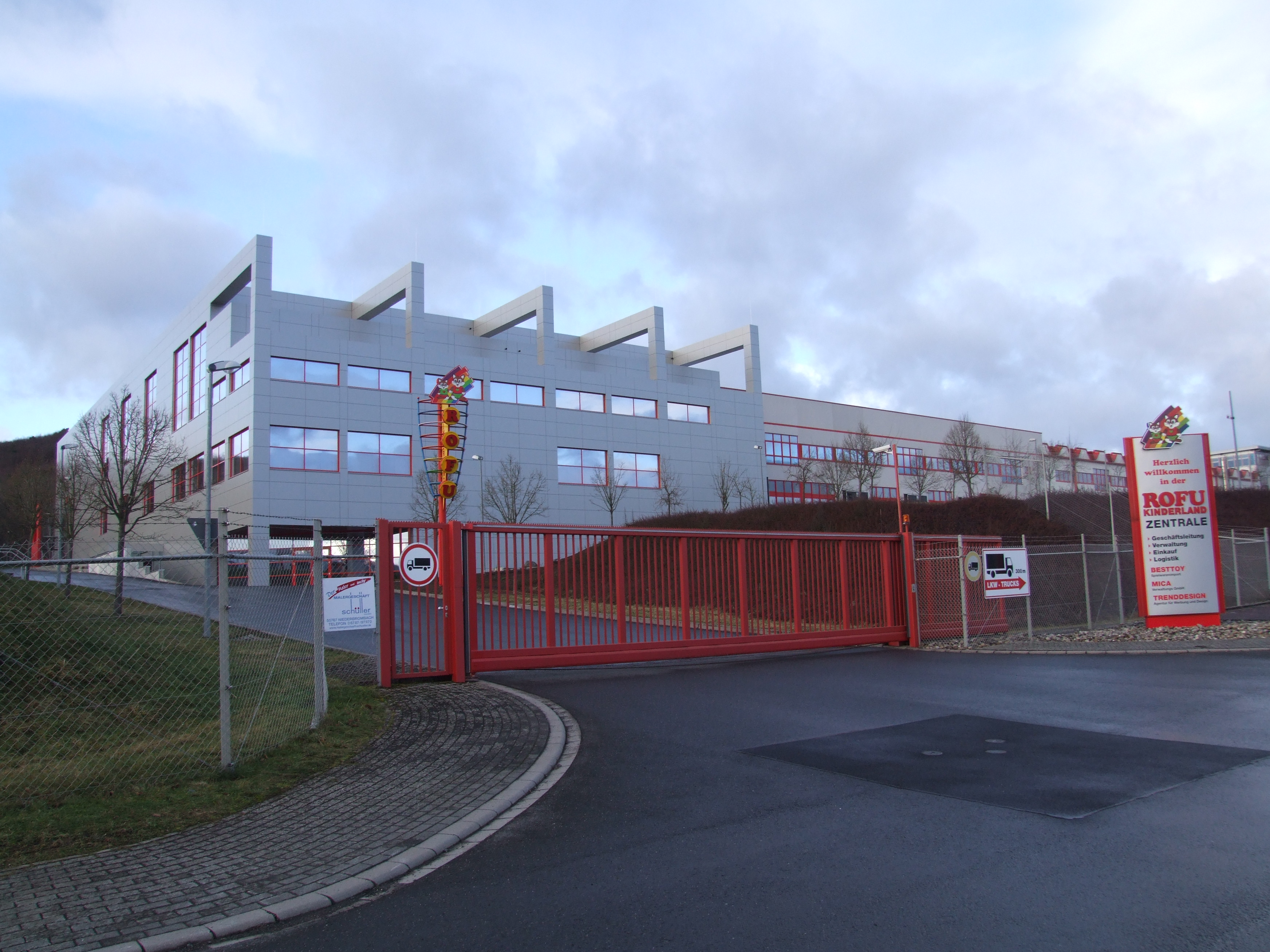 Zentrale Rofu Kinderland, Firmenzentrale , Hoppstädten-Weiersbach